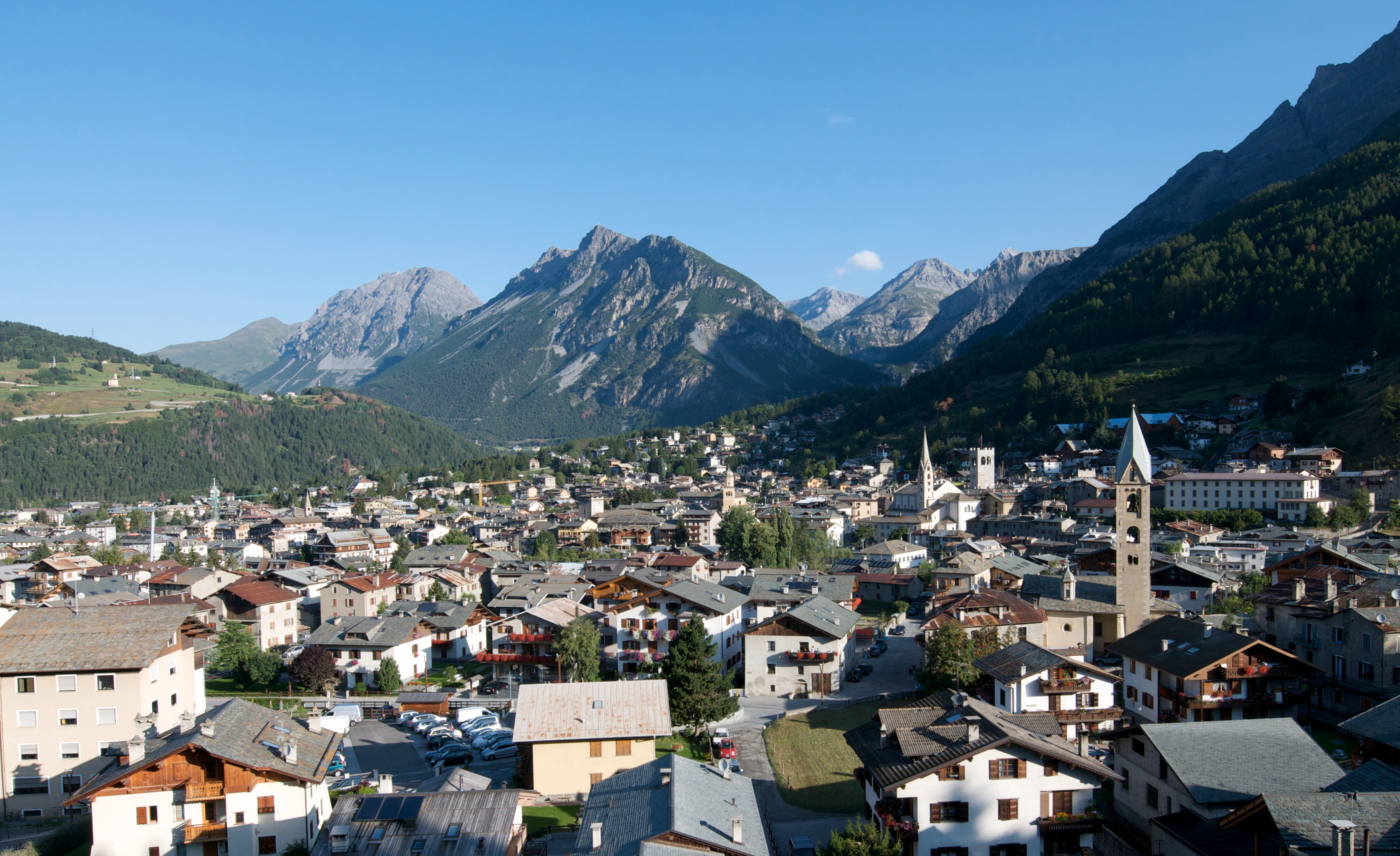 Bormio da Villa Feleit